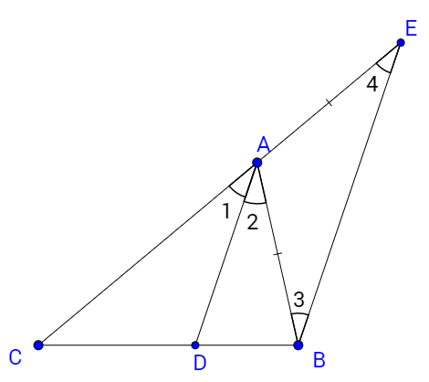 Зображення є ілюстацією теореми про бісектрису та її доведення методом подібності